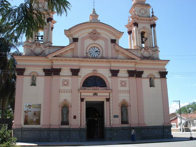 Igreja Matriz "Bom Jesus", Tremembe/SP